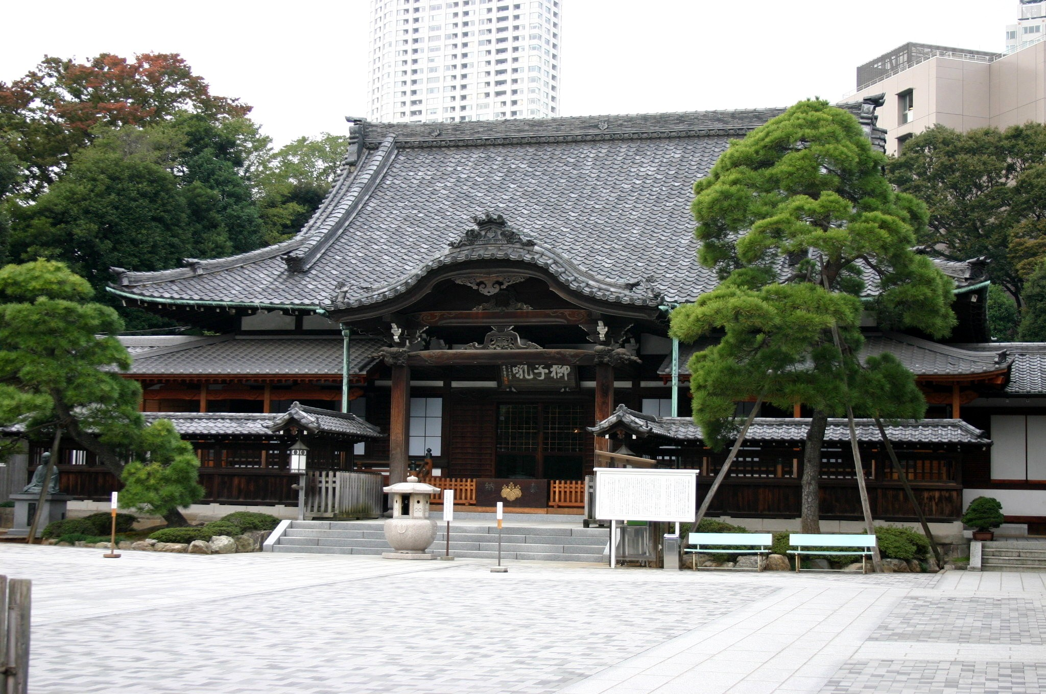 2º Templo Sengakuji